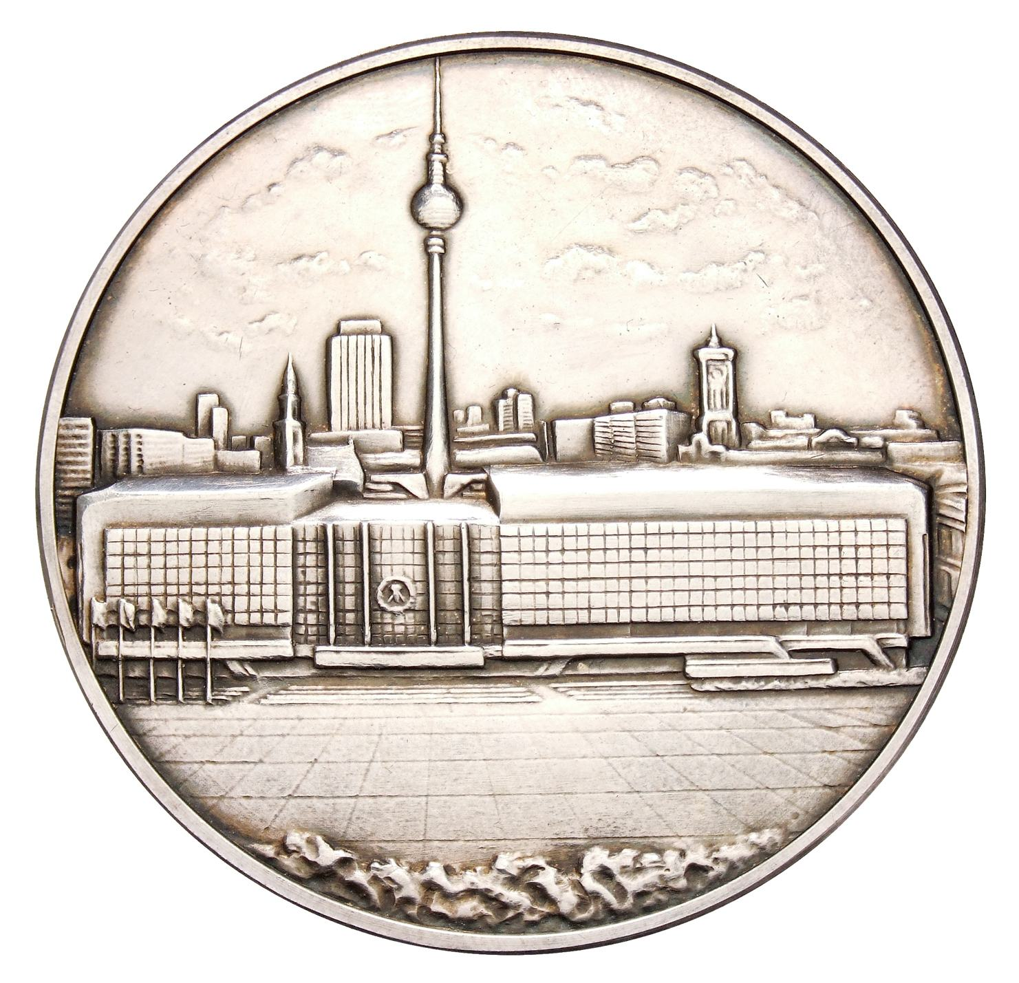 Evelyn Hartnick: Palast der Republik. Prägemedaille von 1977